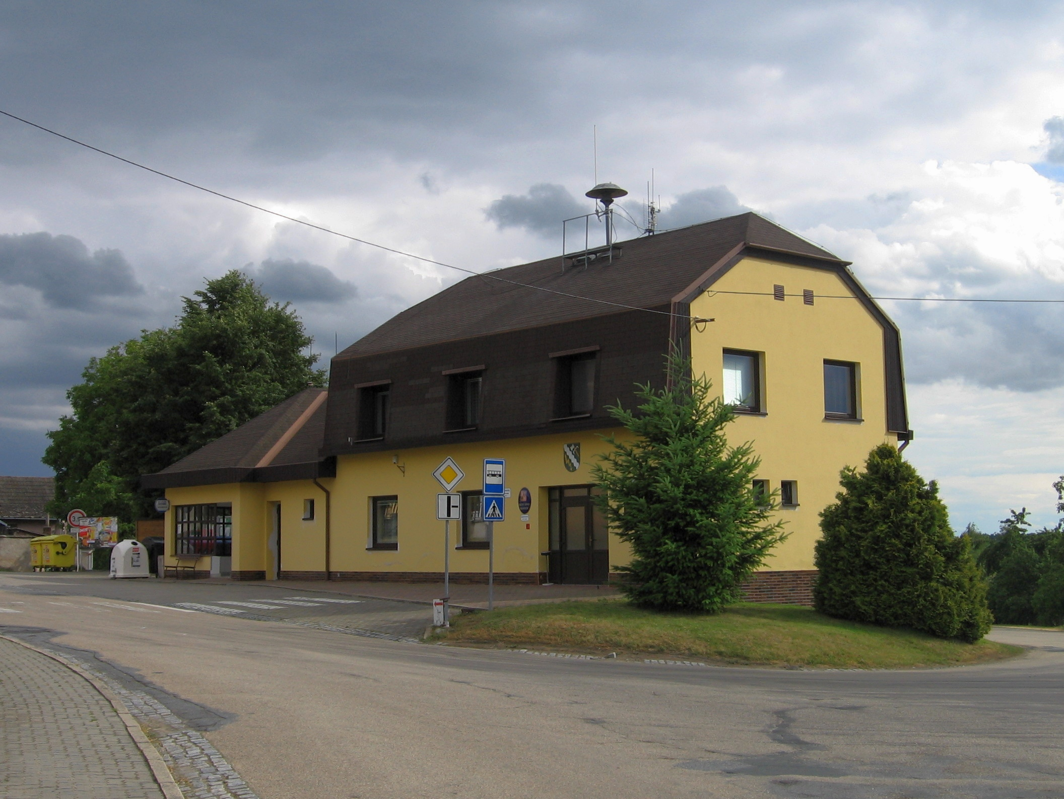 Kramolín (okres Třebíč) - obecní úřad.